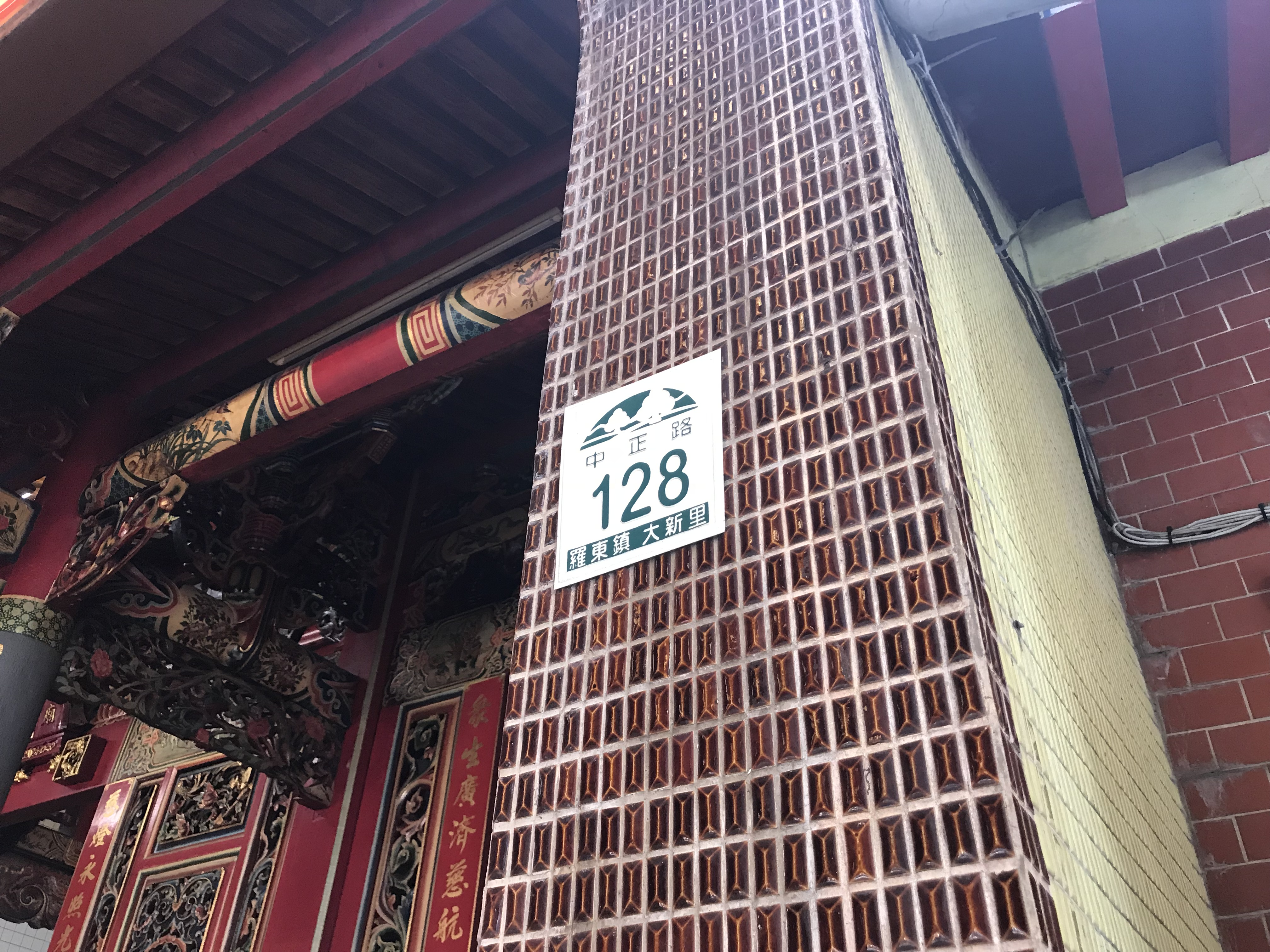 羅東城隍廟門牌